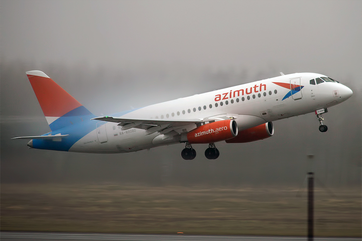 Azimuth, RA-89080, Sukhoi Superjet 100-95LR